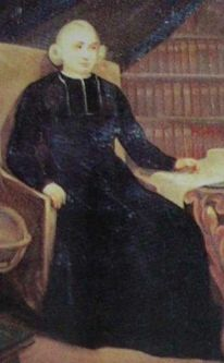 Portrait de Pierre Noury